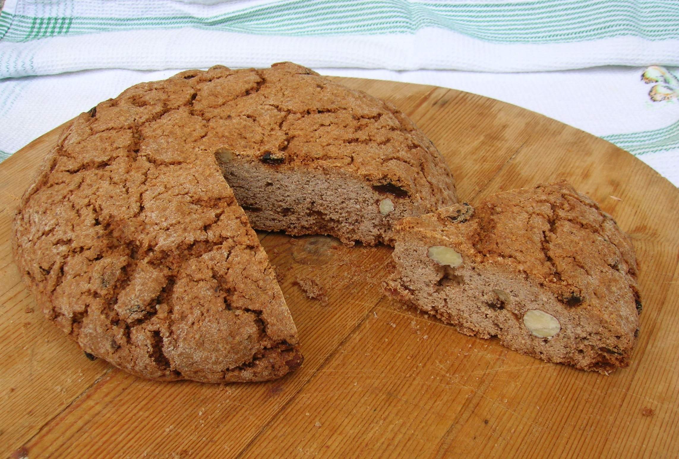 La Flantze, pane di segale e frumento dolce con uvetta, mandorle e noci.